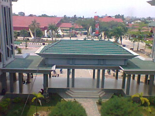 PSB IAIN ANTASARI BANJARMASIN